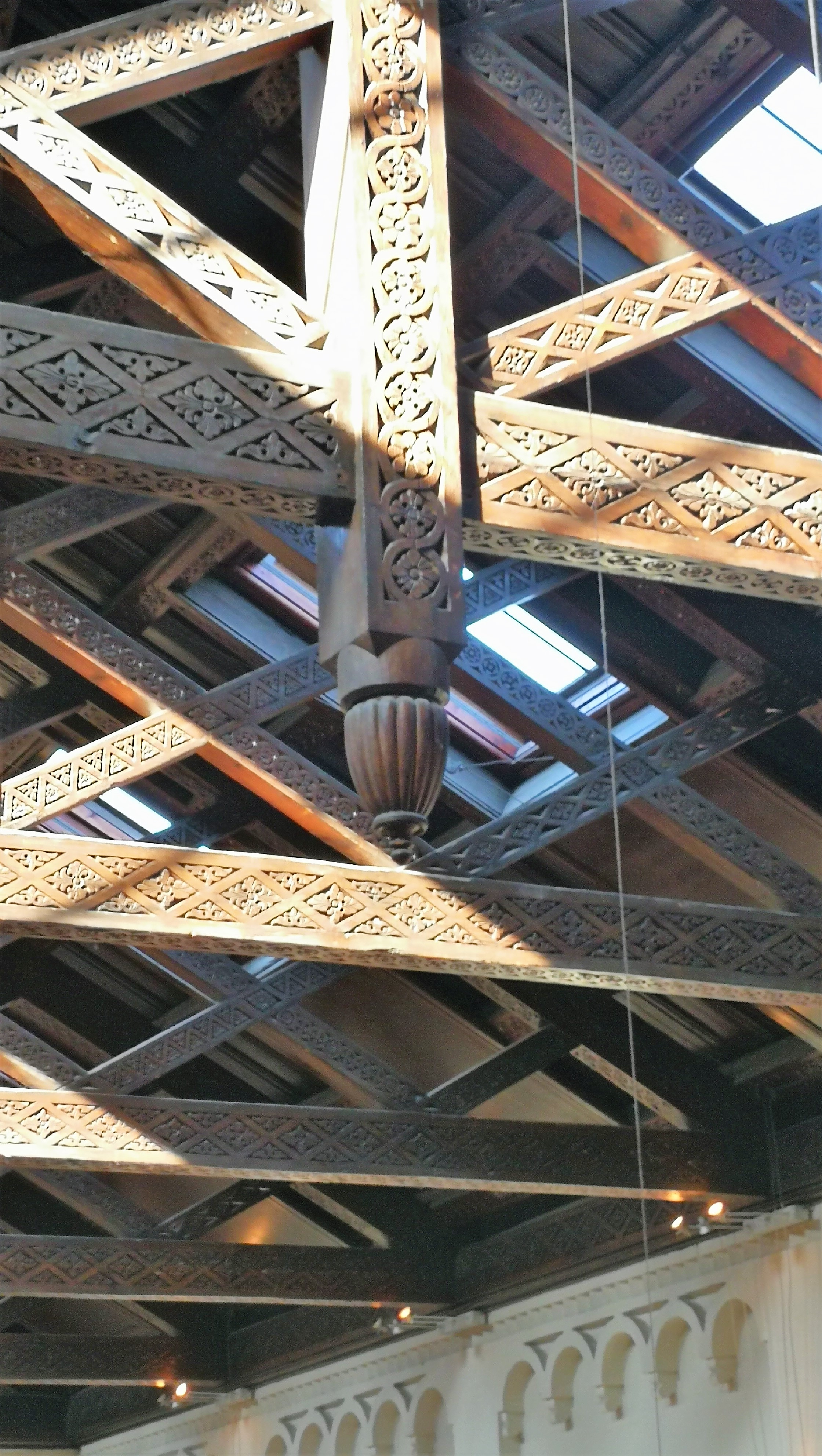 Bygningskulturens Hus